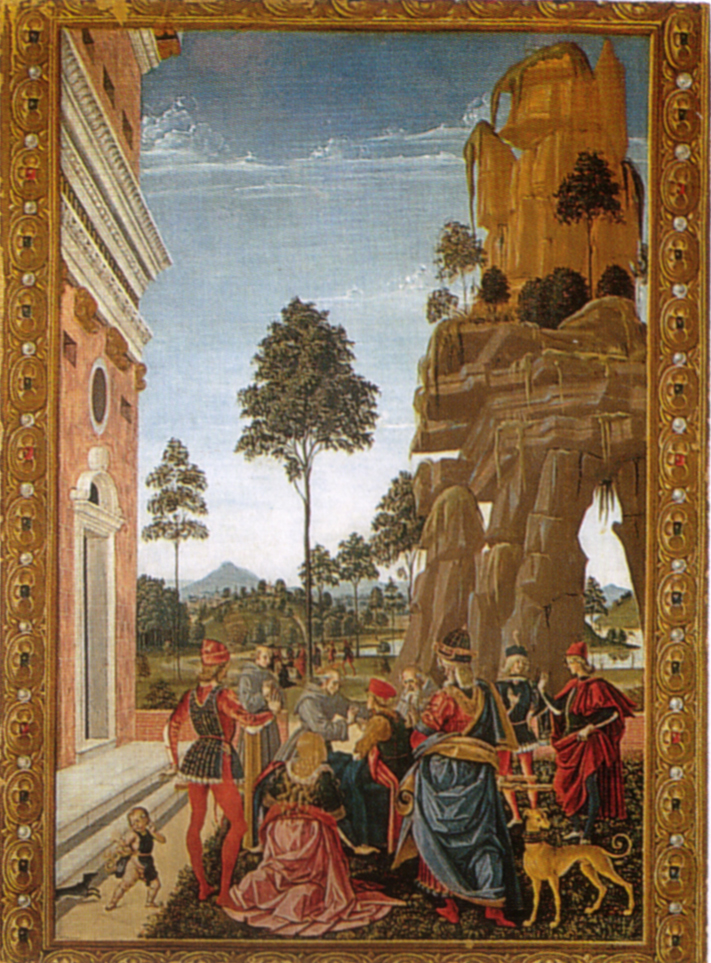 Saint Bernardino saves a dead man Pintoricchio Panel Perugia, Galleria Nazionale dell'Umbria